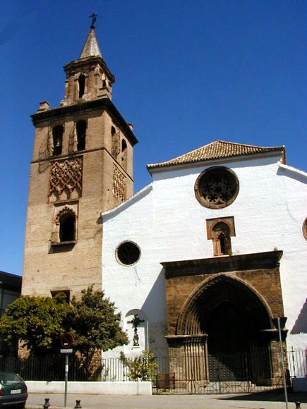 Parroquia de Omnium Sanctoru. Fachada principal